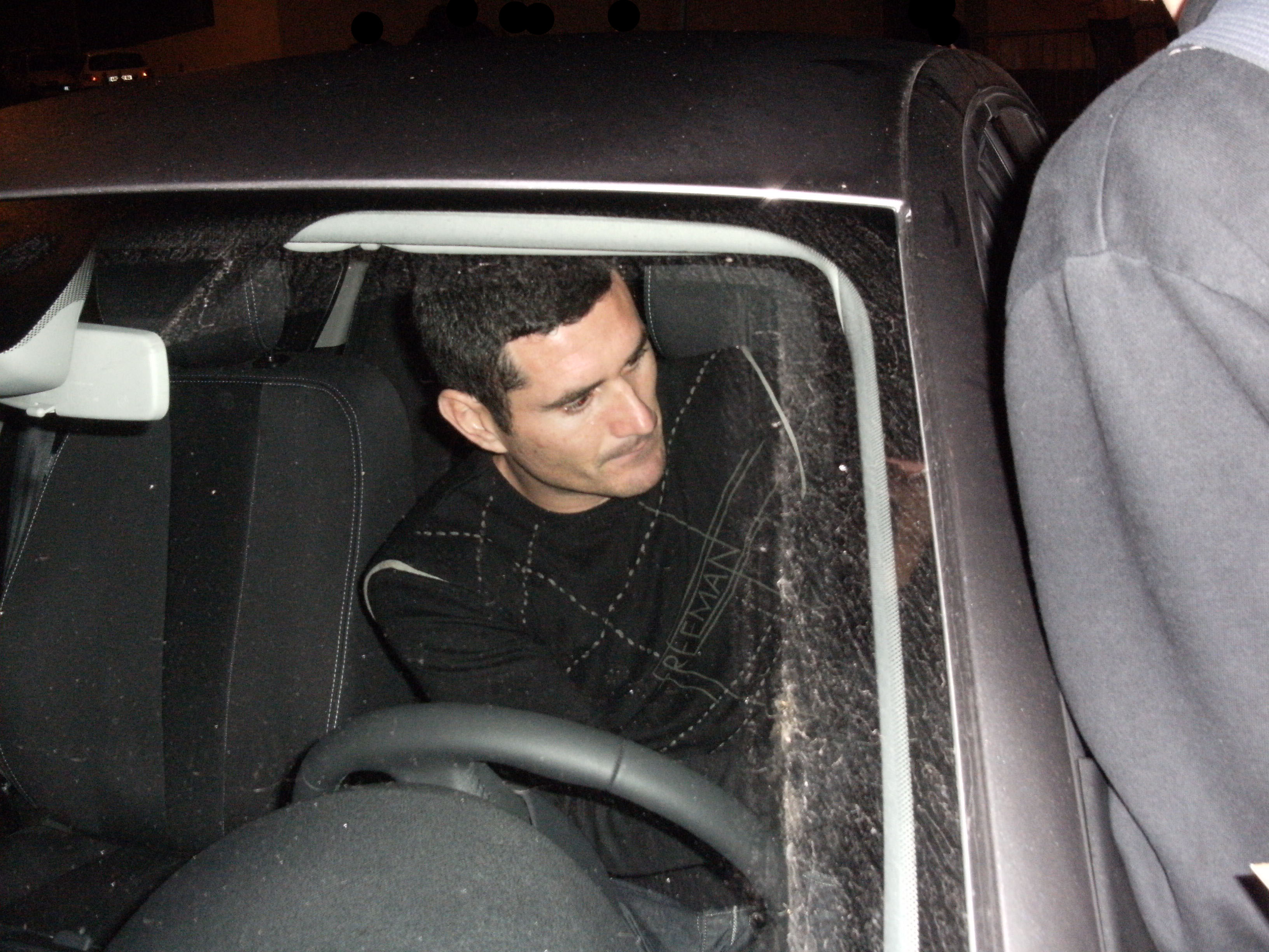 Julien Rodriguez signant des autographes à la sortie du centre d'entraînement Robert Louis-Dreyfus